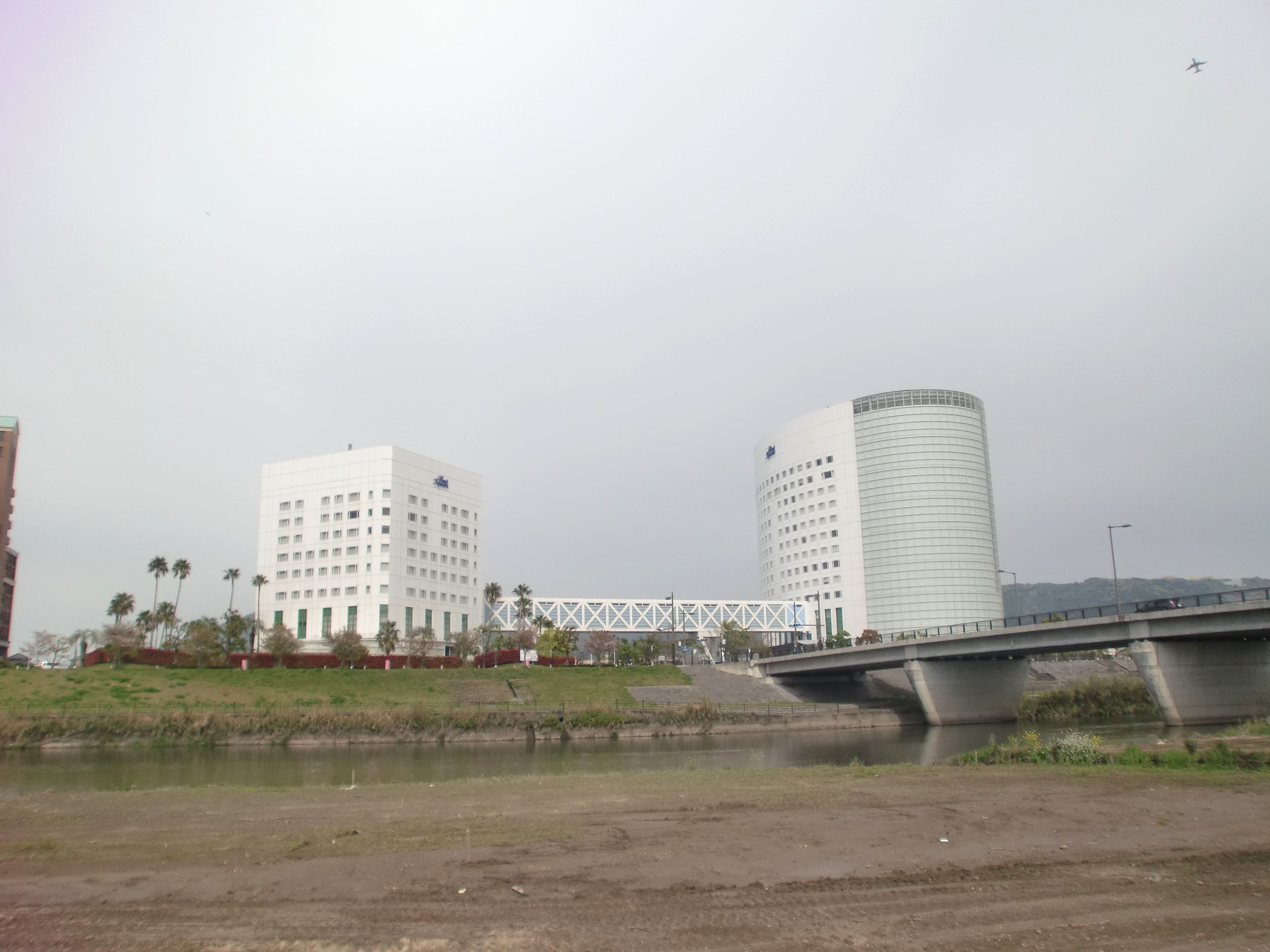 ホテル京セラを天降川河川敷から撮影。